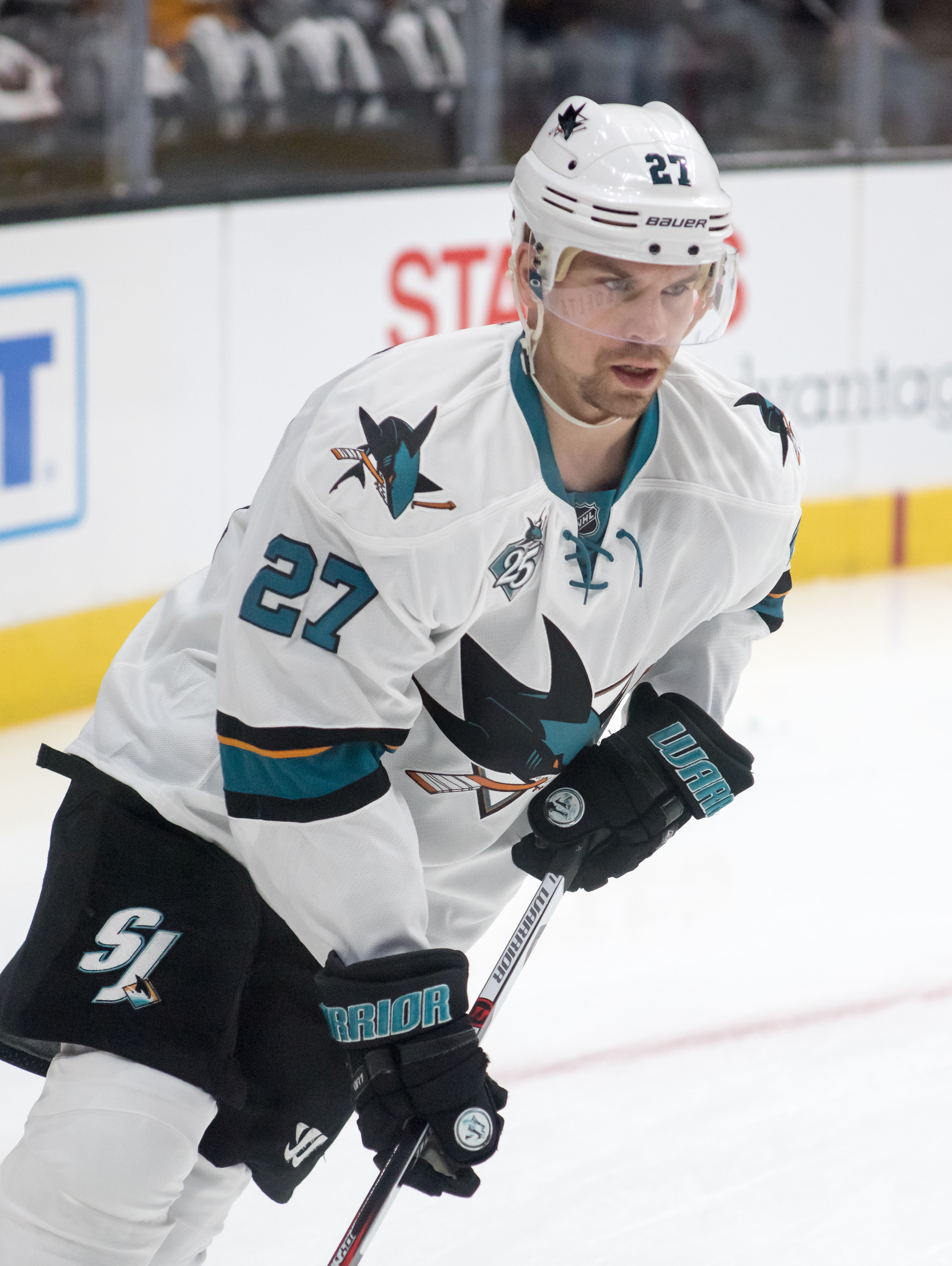 Joonas Donskoi